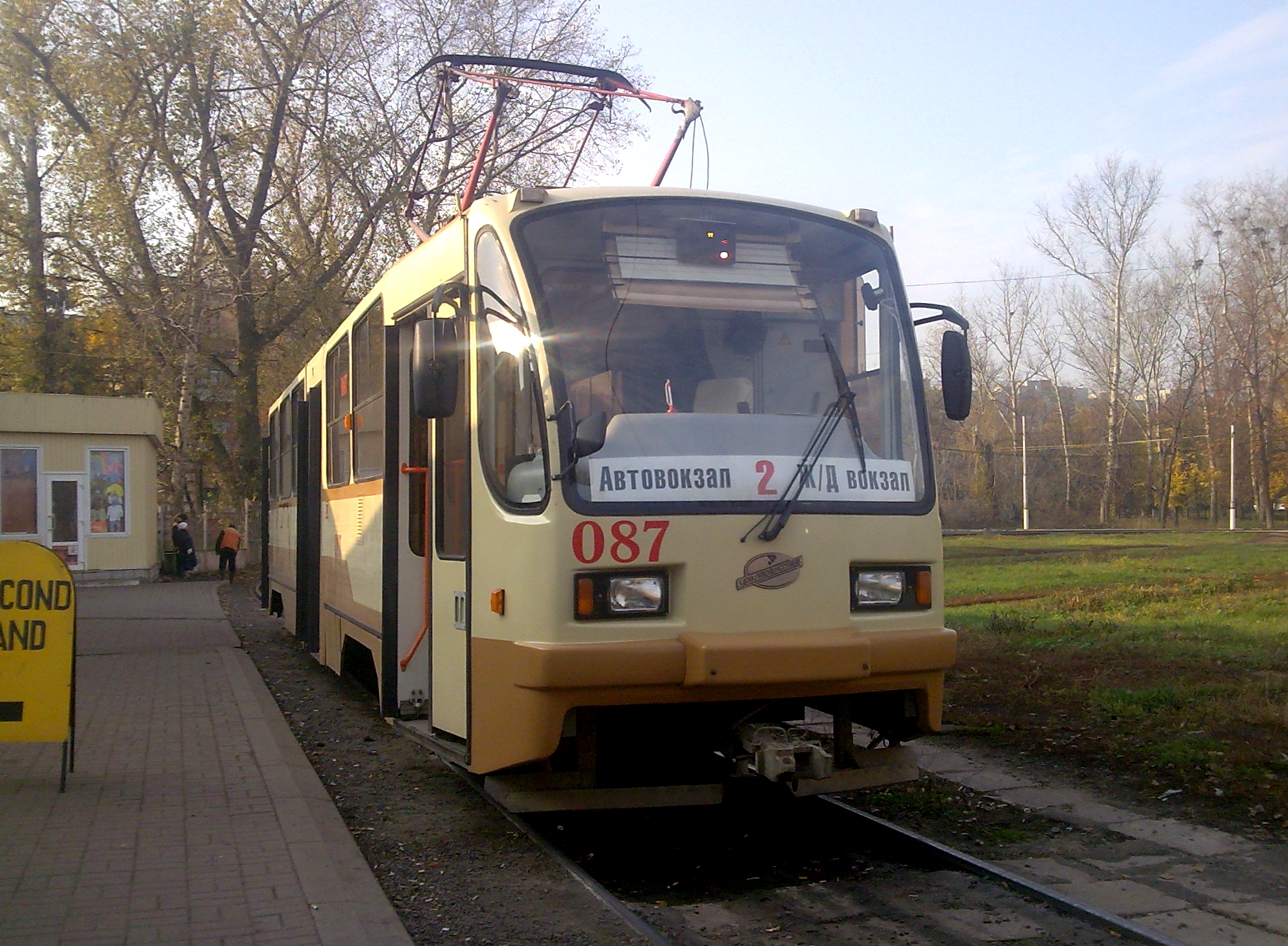 Трамвайный вагон 71-403 в Курске.